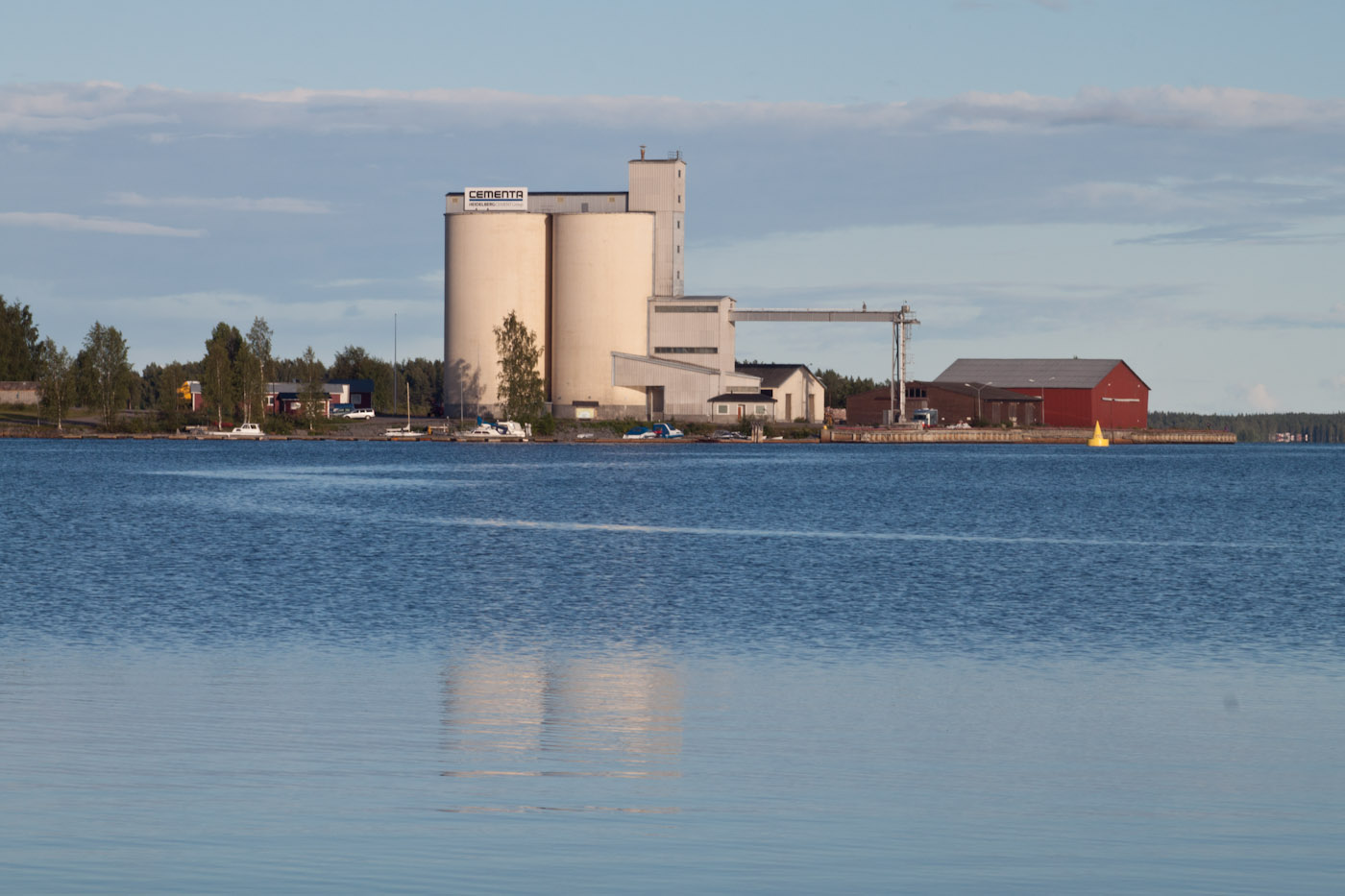 Töre-3944